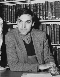 Ben Pimlott